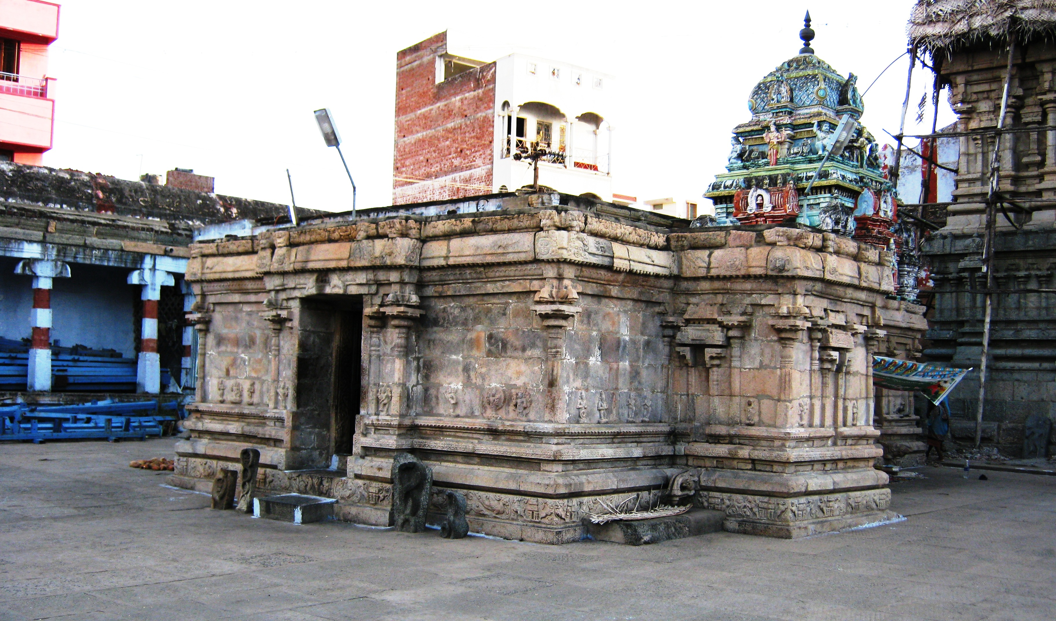 SRI KAILASANATHAR SWAMY TEMPLE, Tharamangalam, Salem